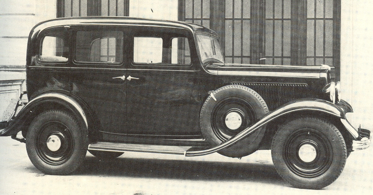 Fiat 518 C Sedan (1933)